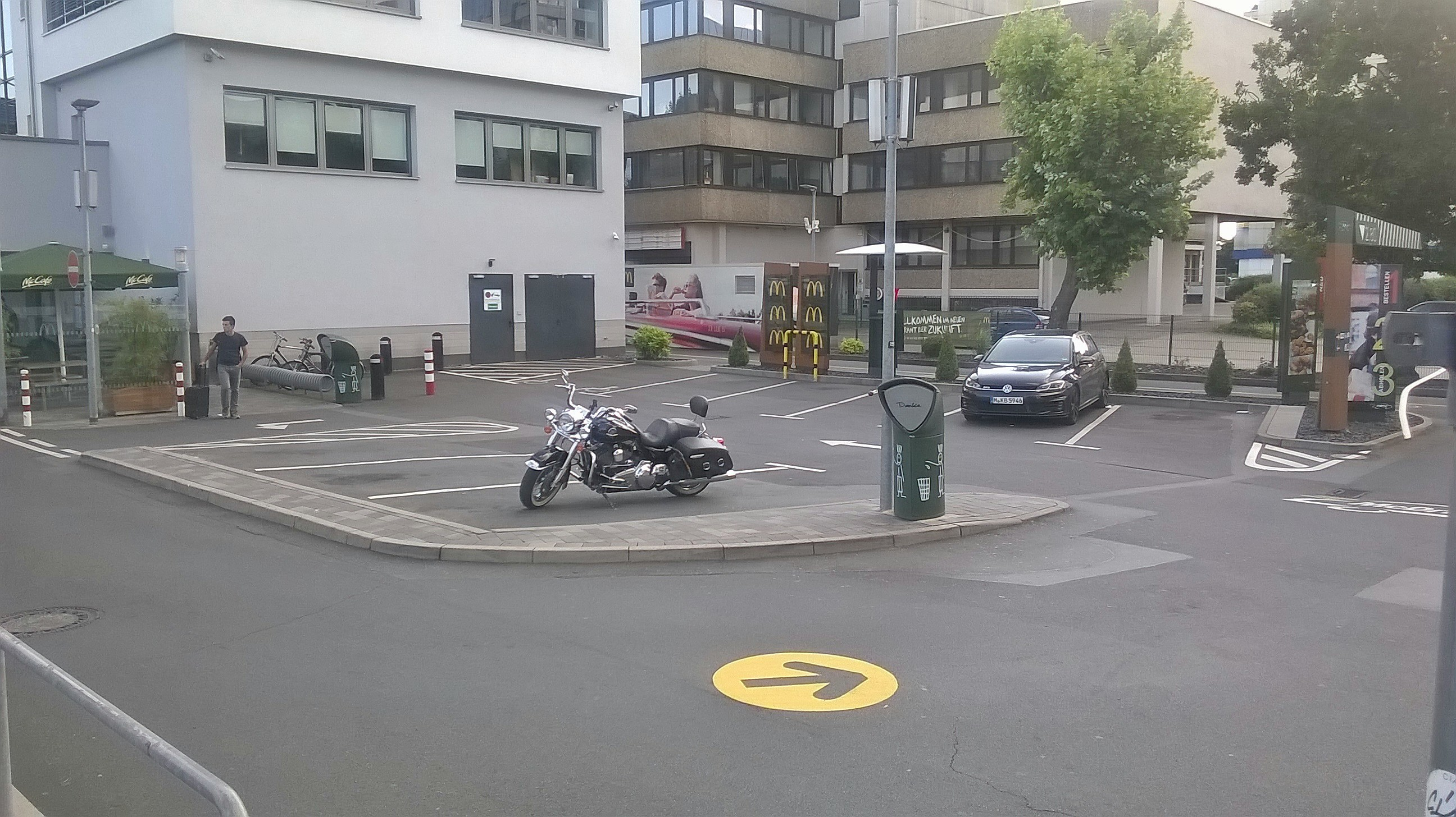 Parkplatz des McDonald's in Offenbach-Kaiserlei. Ort des Geschehens